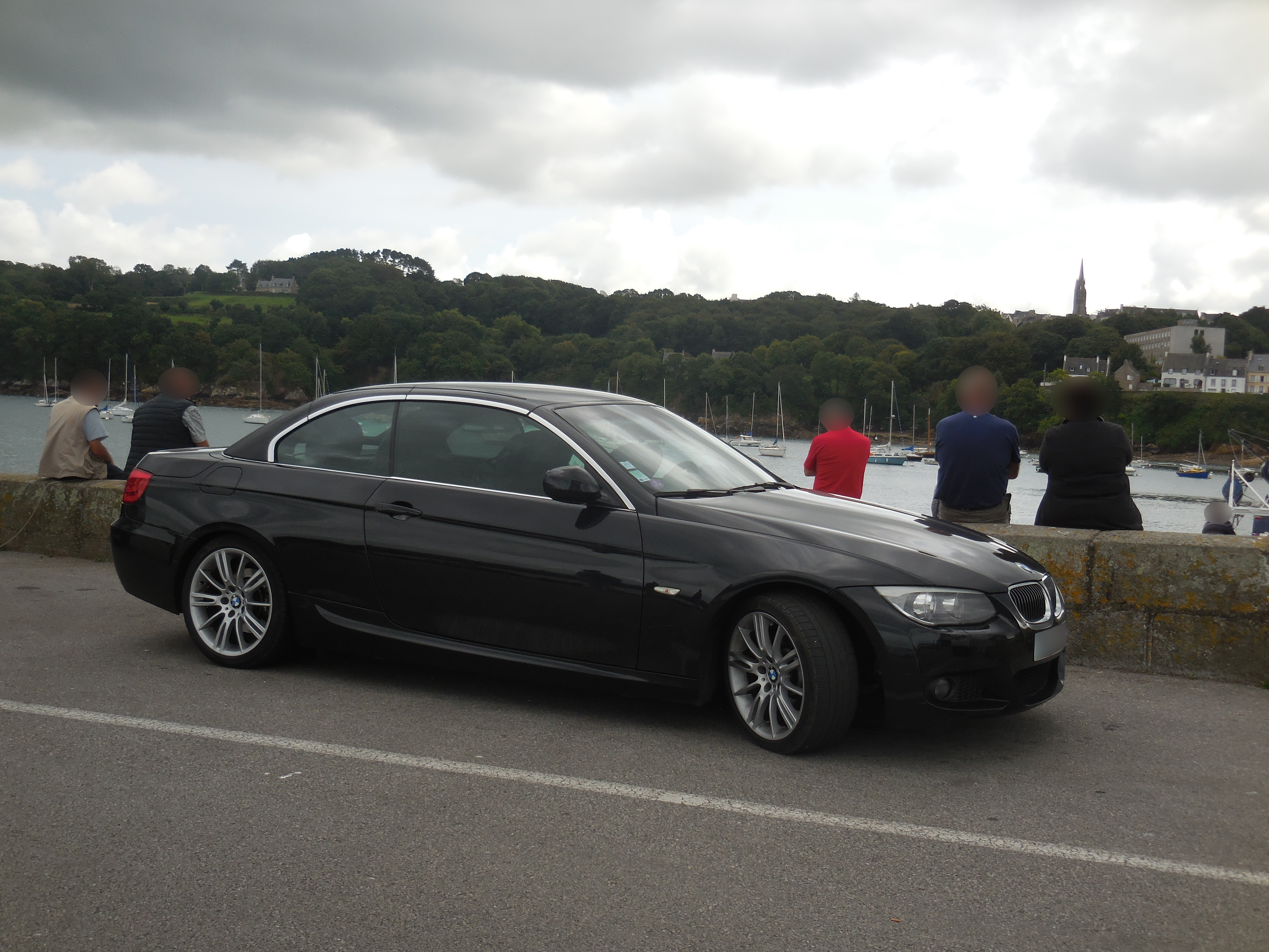 BMW Série 3 E93 (cabriolet) 325i (restylage)